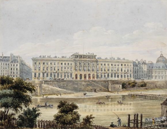 Hôtel des Monnaies (Paris). Façade sur le quai de Conti. Dessin à la plume et encre de Chine, aquarelle.